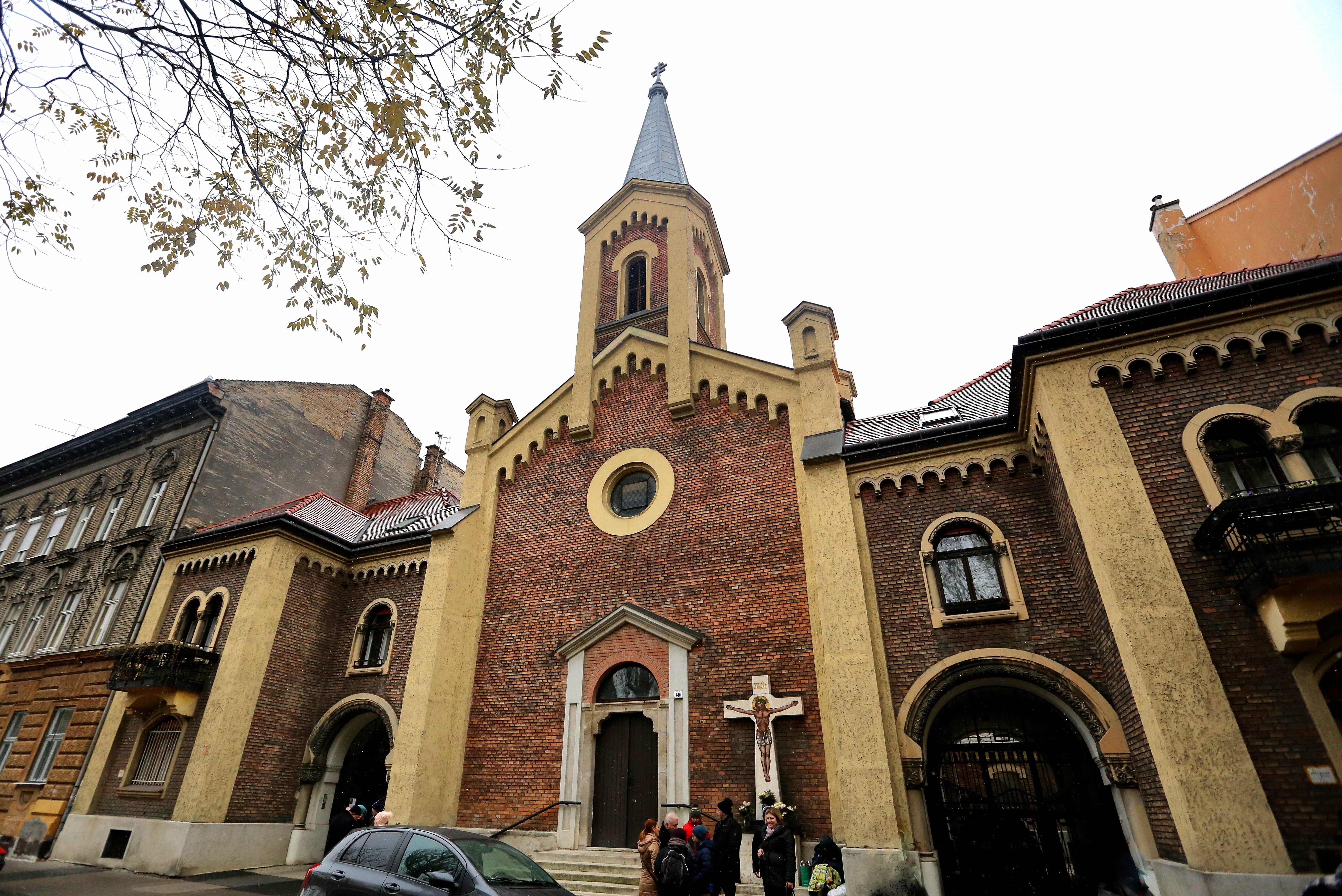 Rózsák terei Istenszülő Oltalma görög katolikus templom